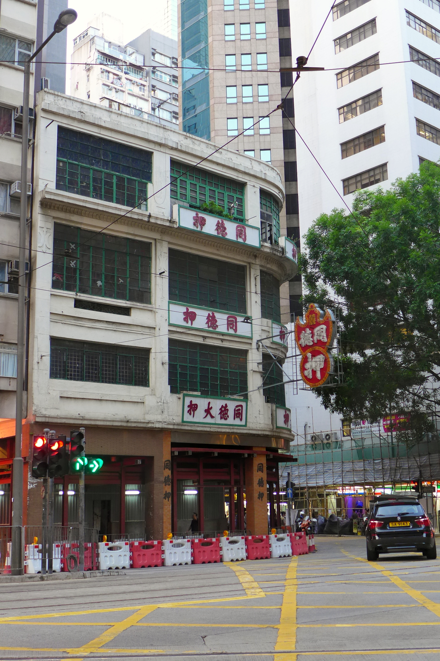 Tung Tak Pawn